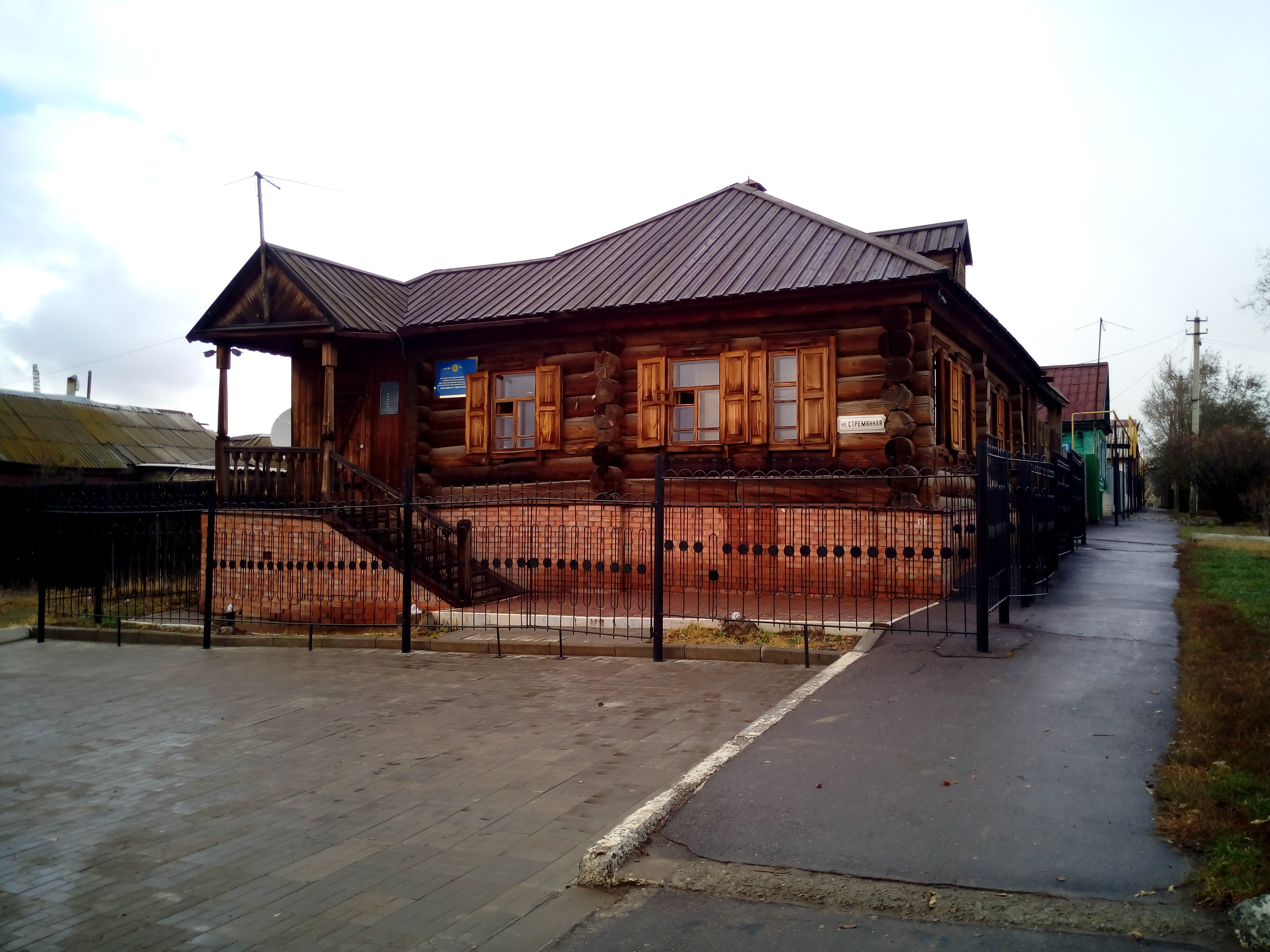 Дом-музей Емельяна Пугачева